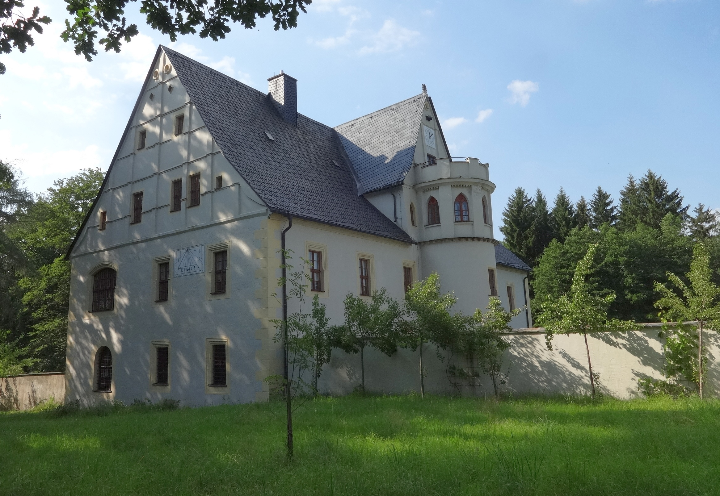 Rittergut in Forchheim, einem Ortsteil der sächsischen Stadt Pockau-Lengefeld im Erzgebirgskreis